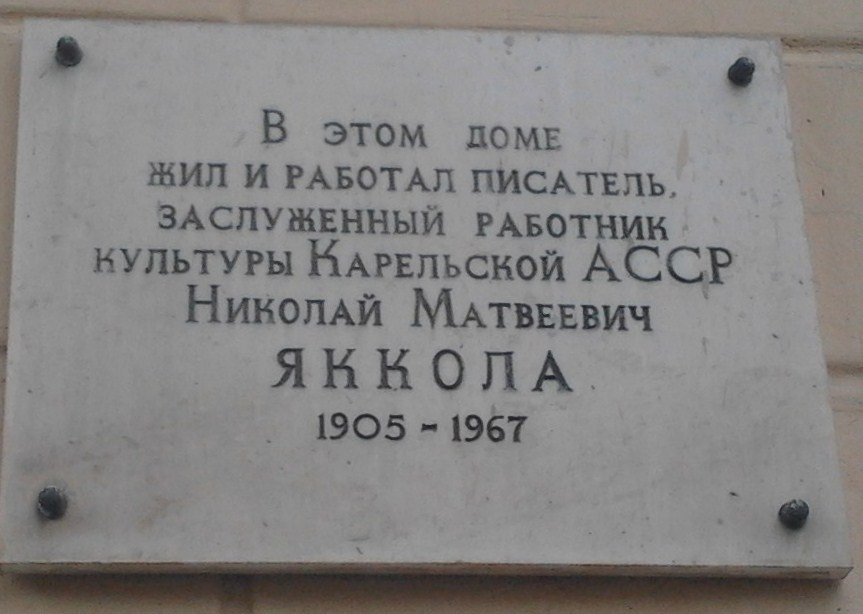 Мемориальная доска в Петрозаводске на пр.Ленина,8.